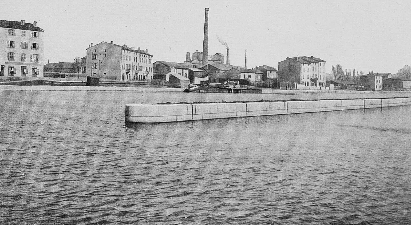 Dictionnaire illustré des communes du département du Rhône. Tome 1 / par MM. E. de Rolland et D. Clouzet.